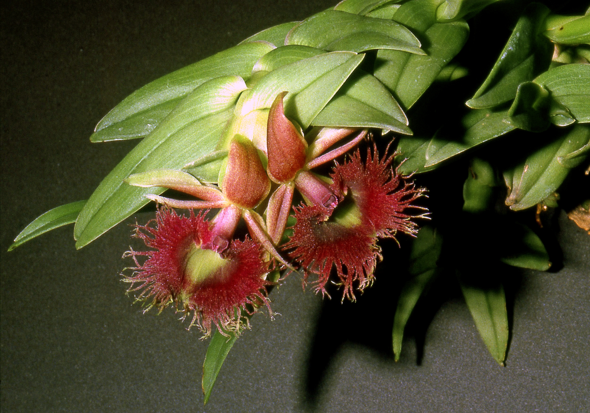 Epidendrum medusae